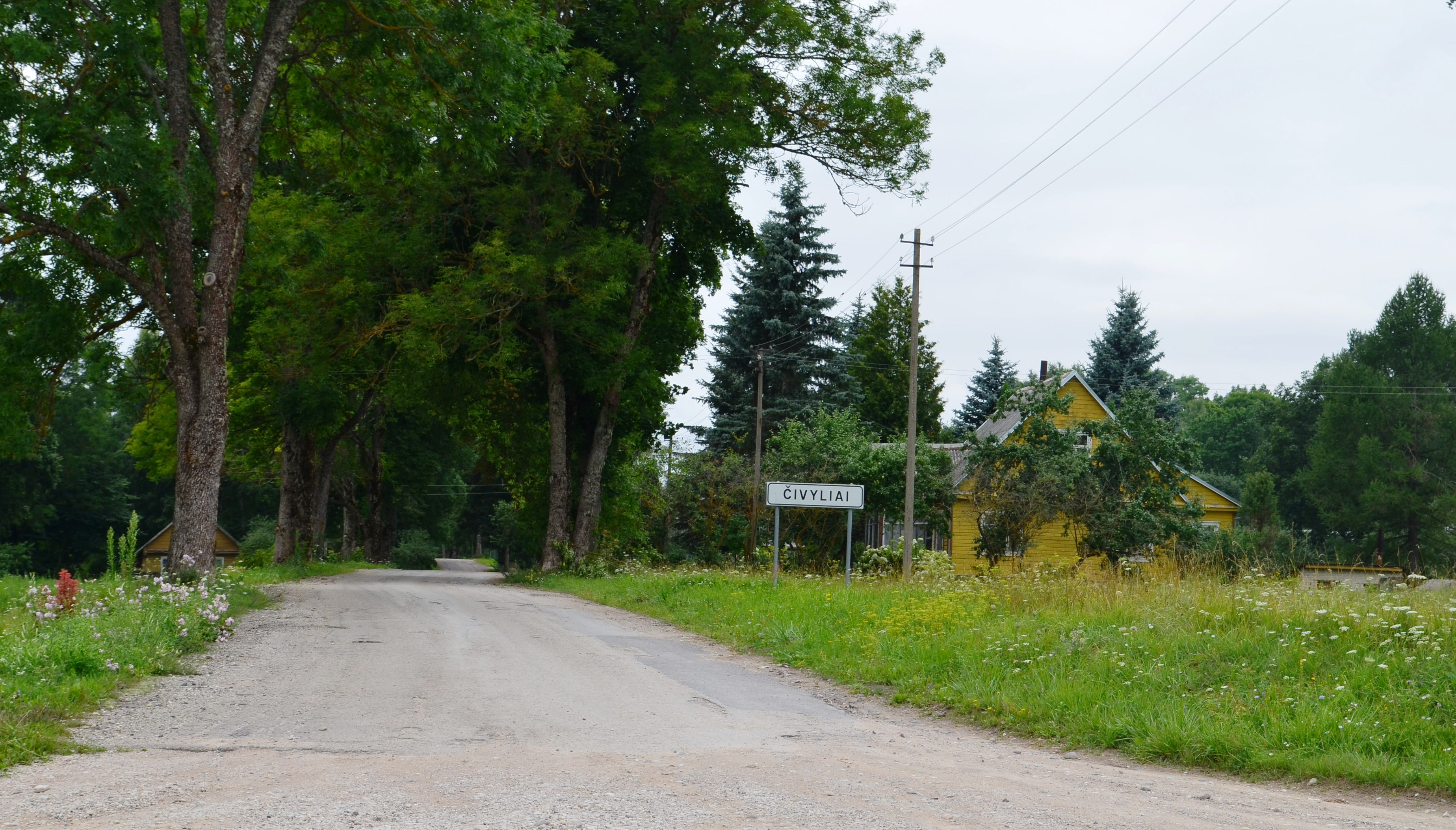 Čivyliai, Rokiškio r.